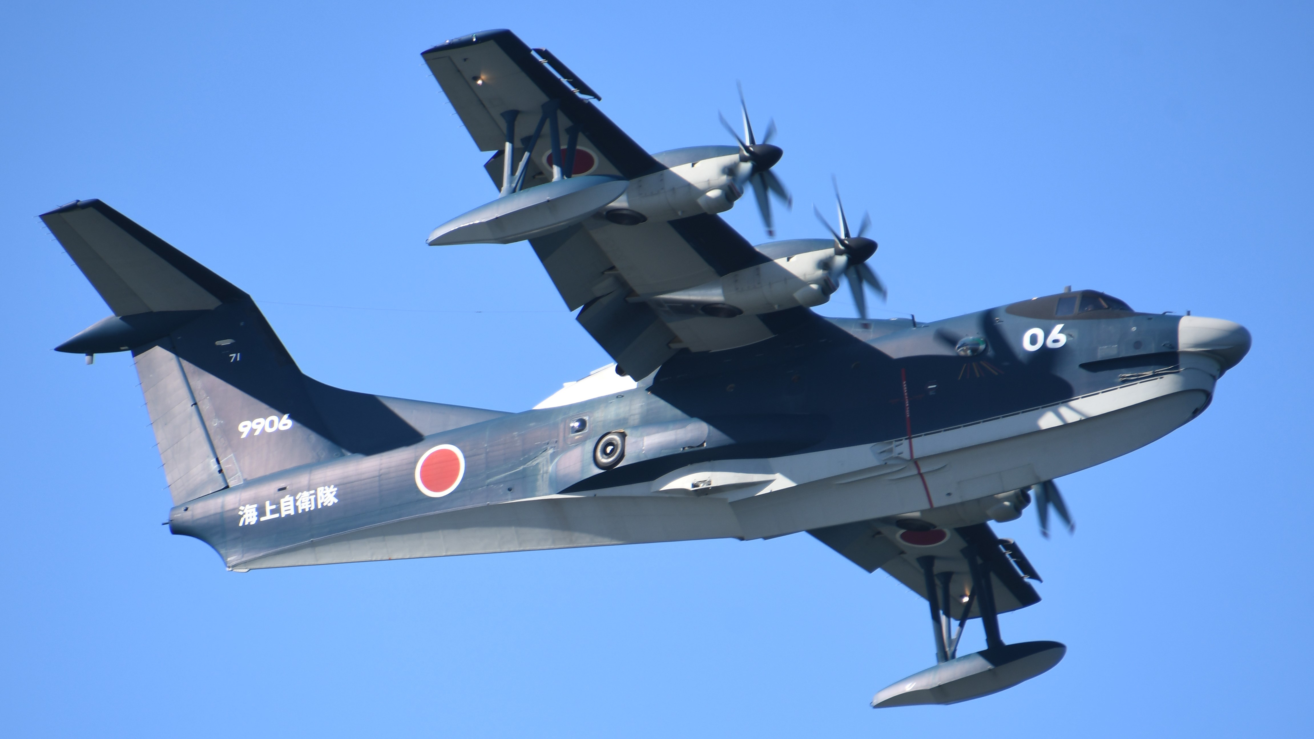 海上自衛隊 飛行するUS-2救難飛行艇（9906号機）。2019年11月2日 和歌山港にて。